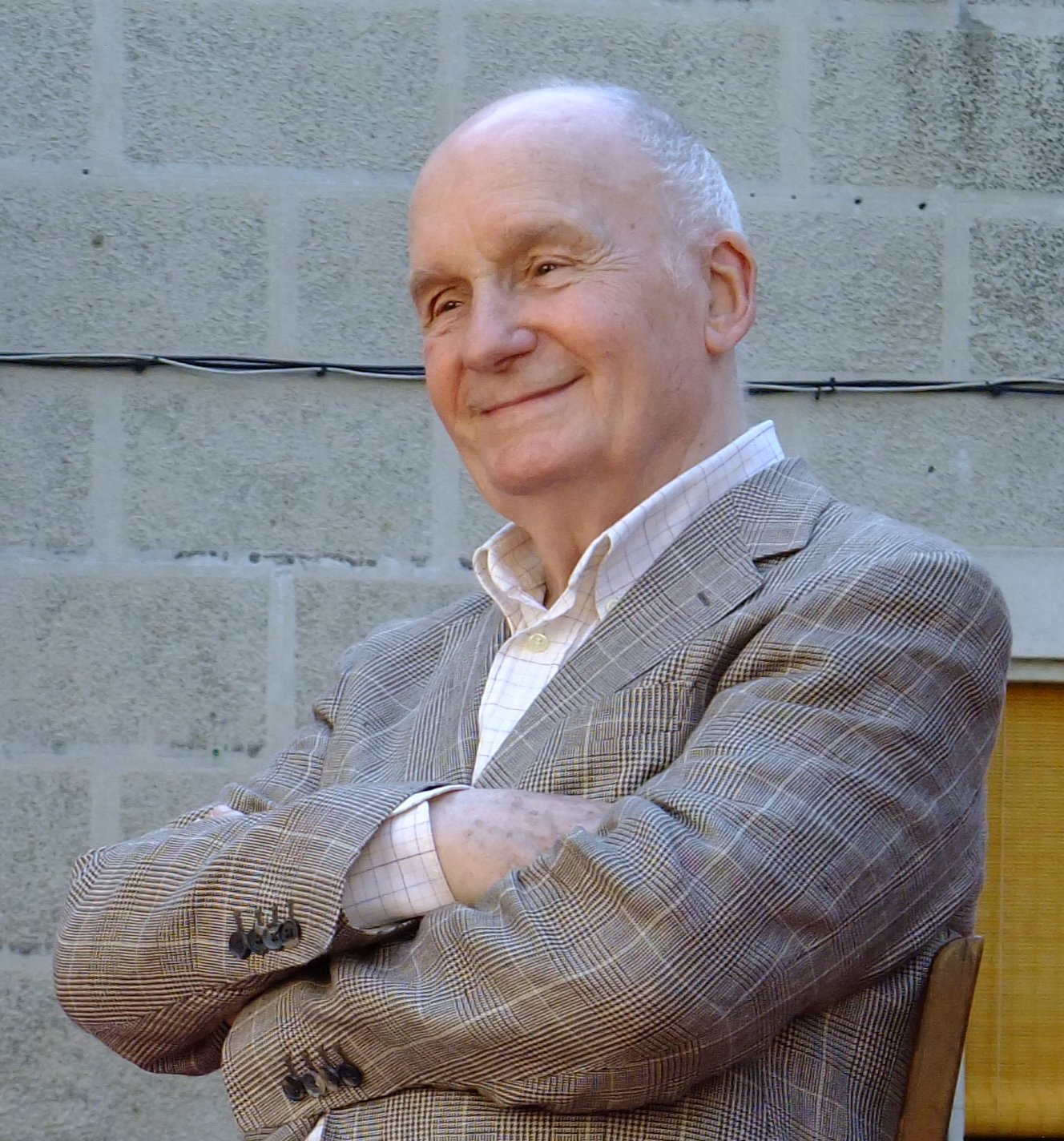 Michel Bouquet à Grignan (Drôme France) pendant le 15° festival de la Correspondance 2010 le 07 juillet 2010.